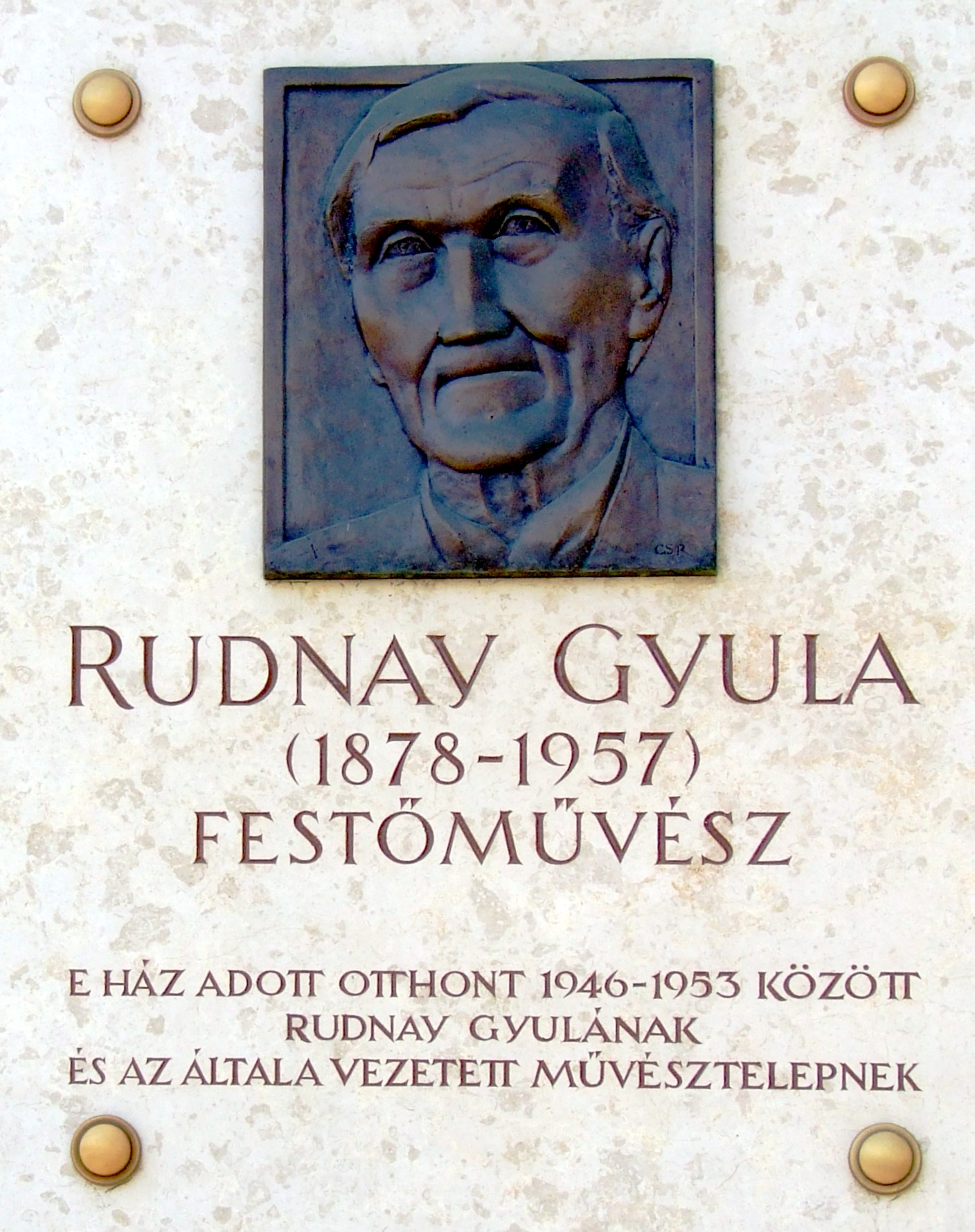 Rudnay Gyula-emléktábla a bajai Nagy István Képtár falán. Csíkszentmihályi Róbert szobrászművész alkotása (2003)